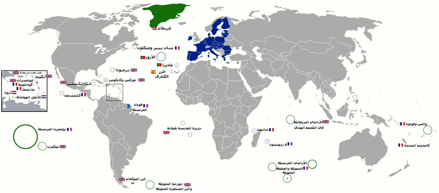 الأقاليم ذات العُضويَّة الخاصَّة في الاتحاد الأوروبي الاتحاد الأوروبي مناطق الأطراف أقاليم ومناطق ما وراء البحار